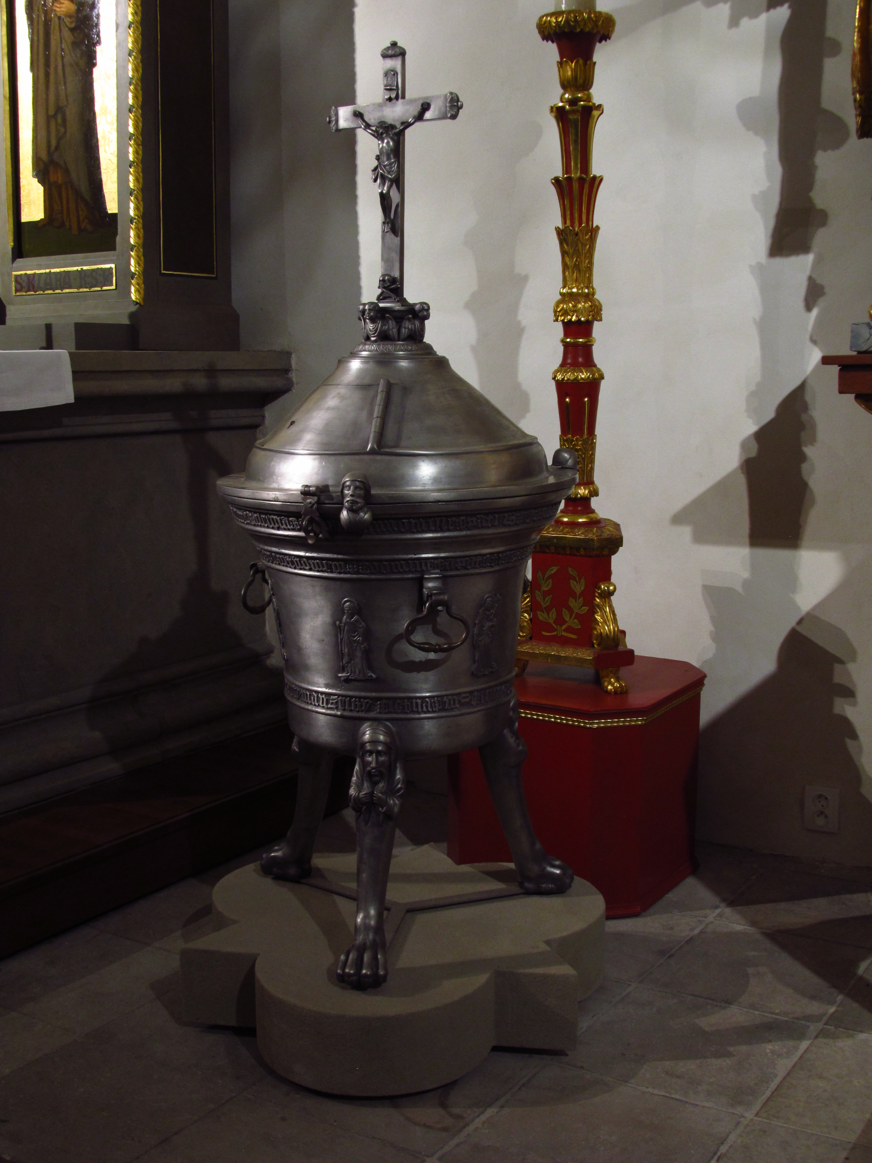 Interiér kostel sv. Haštala, Staré Město, Praha. Cínová křtitelnice z r. 1550.